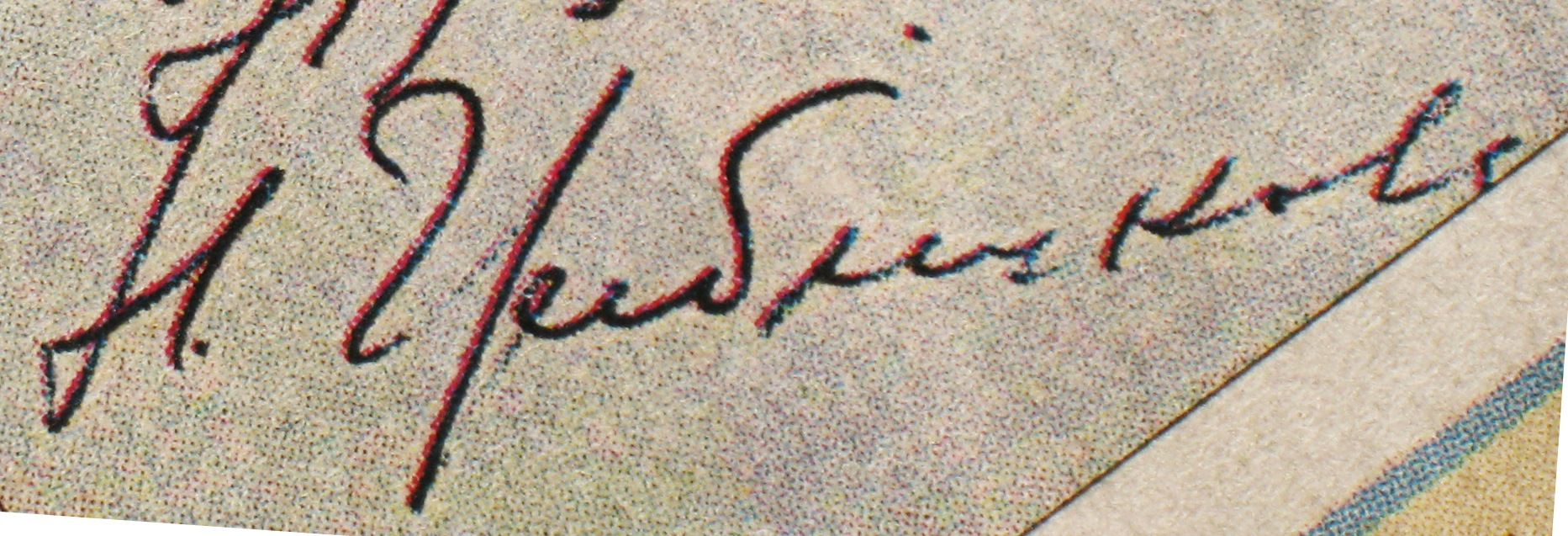 Актриса Нина Гребешкова. Автограф. Крым, лето 1981.